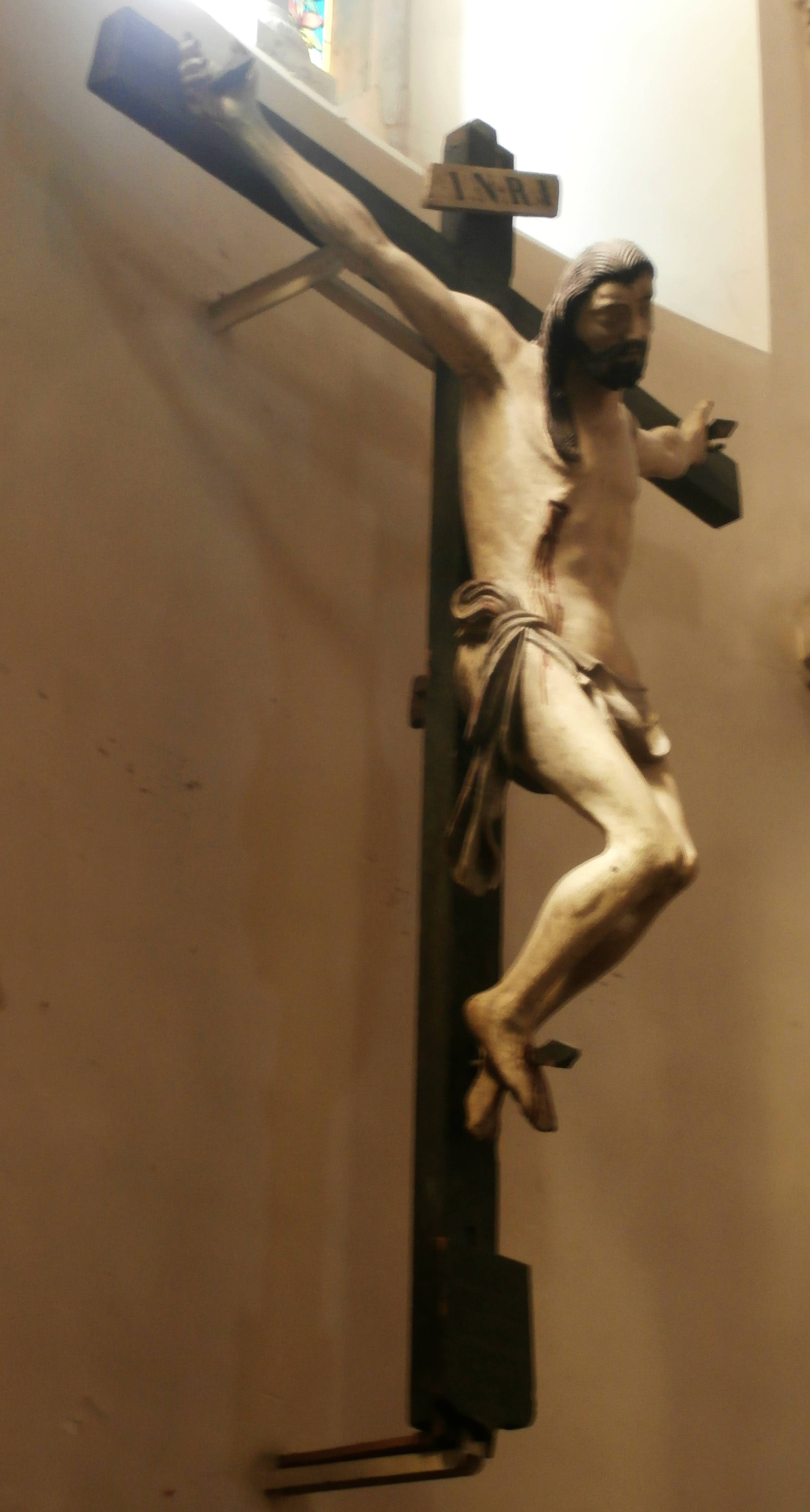 Satillieu: Crucifix en l'église Saint-Priest